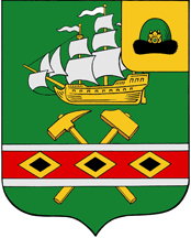 Герб МО — Кораблинское городское поселение